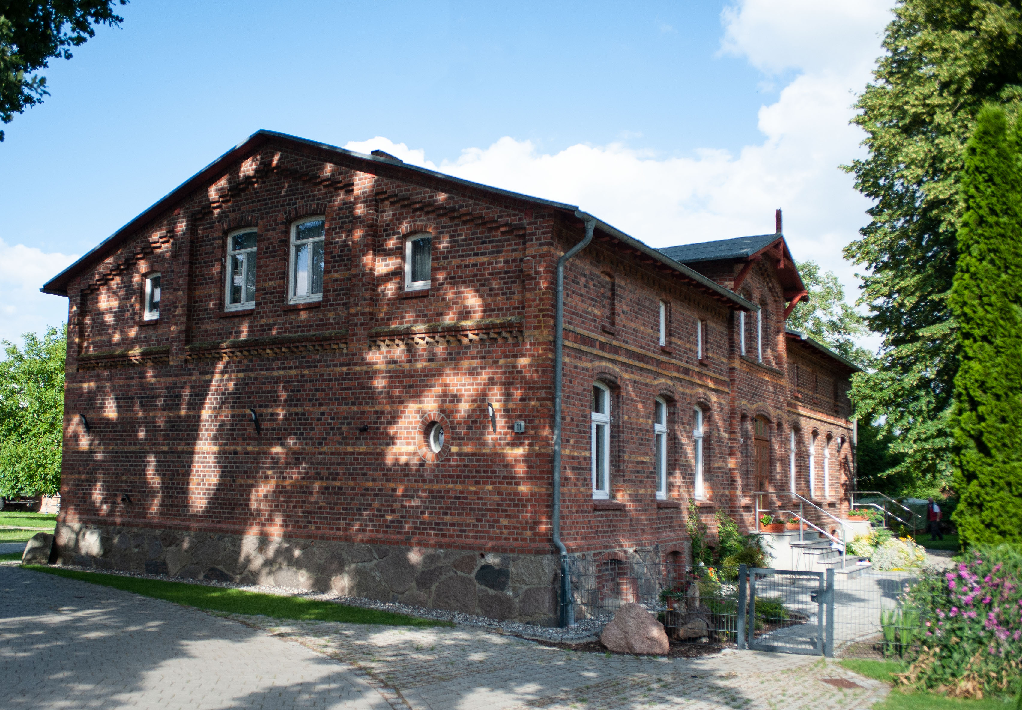 Wohnhaus des Bauernhofs im Heideweg 11 in Klein Stove.